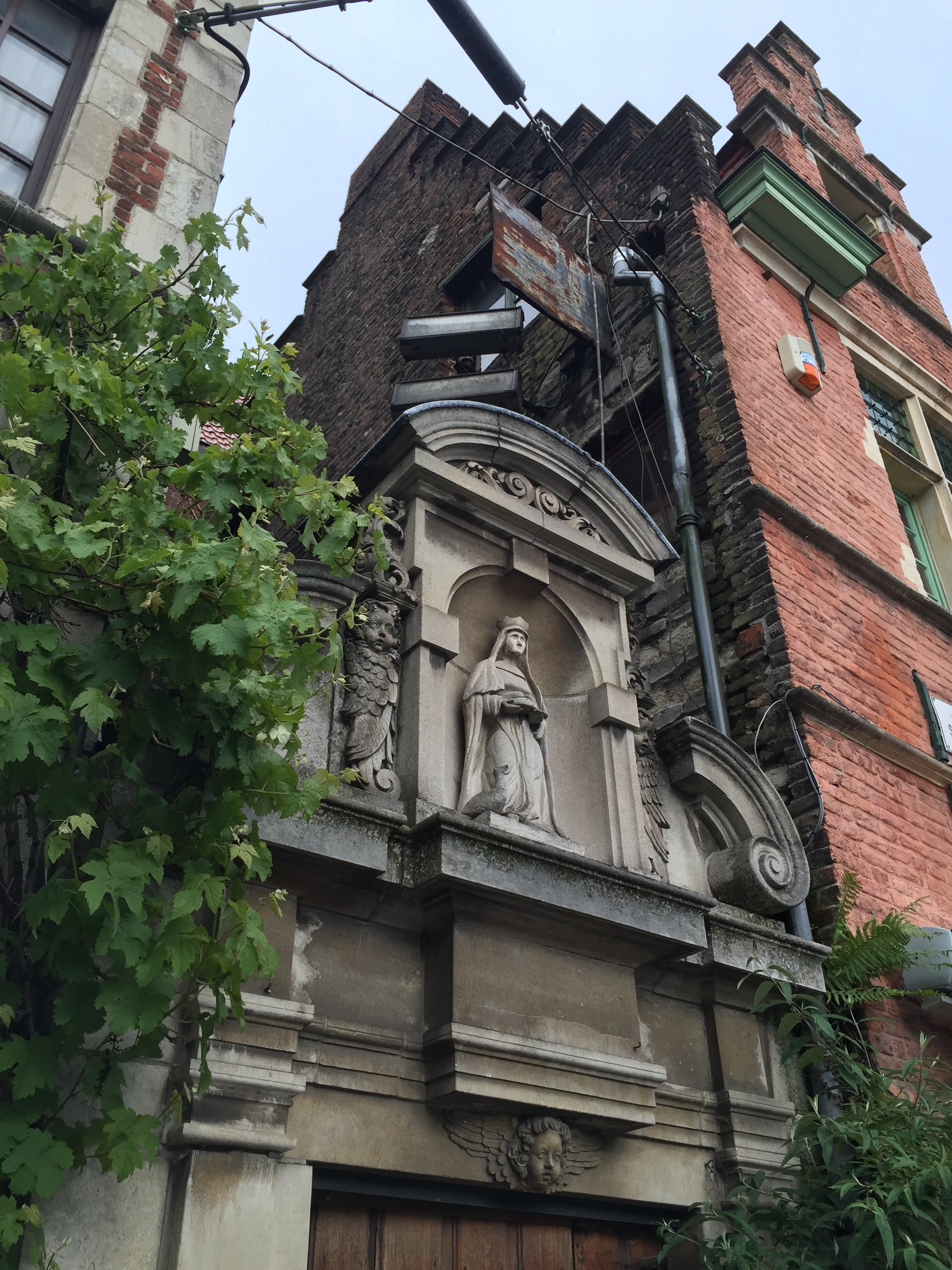 Klein barokpoortje (17de eeuw); hier geplaatst in 1913 en dient nu als achterpoortje van een huis op de Kraanlei. (bron: ArcheoNet Vlaanderen)